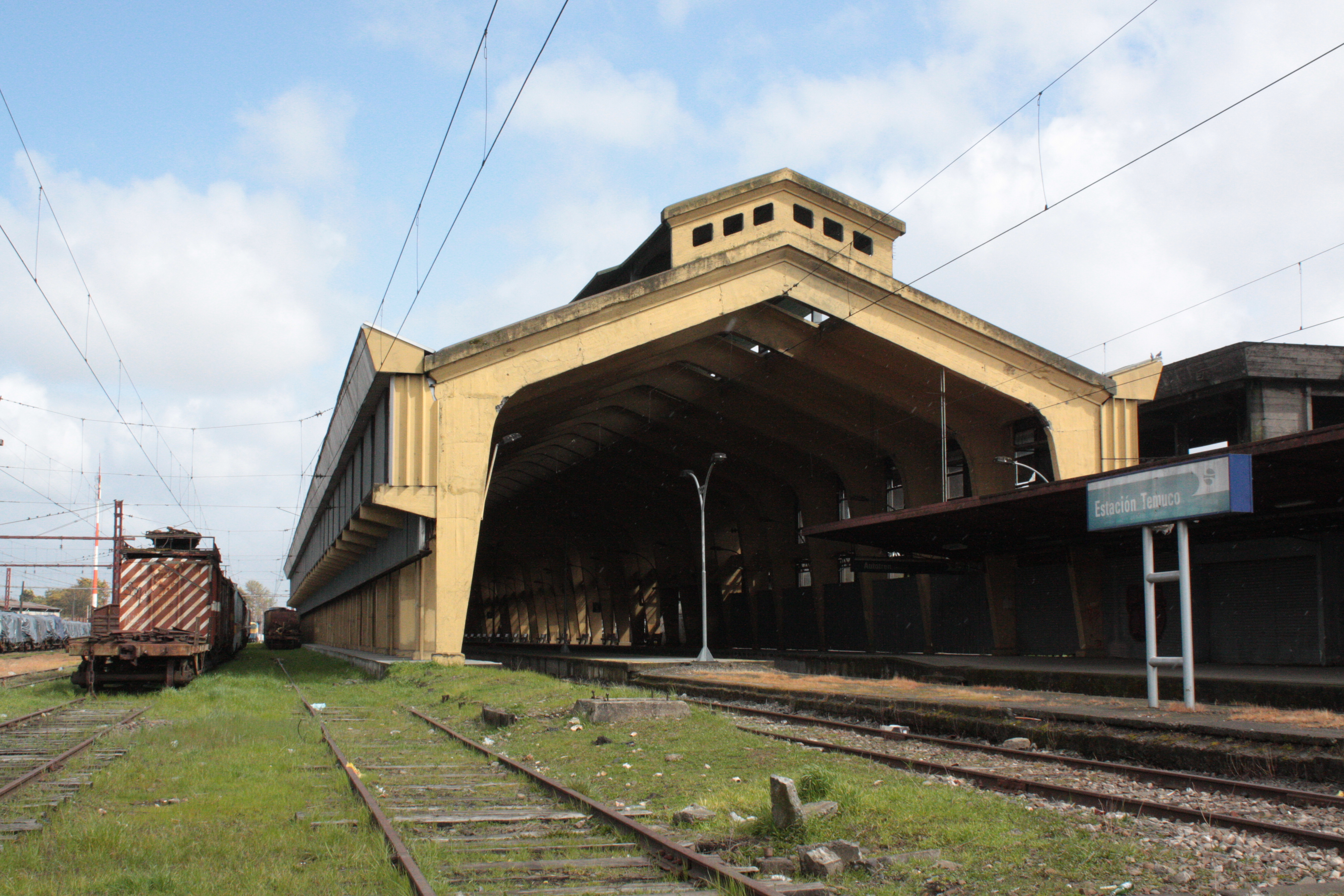 La estación de Temuco